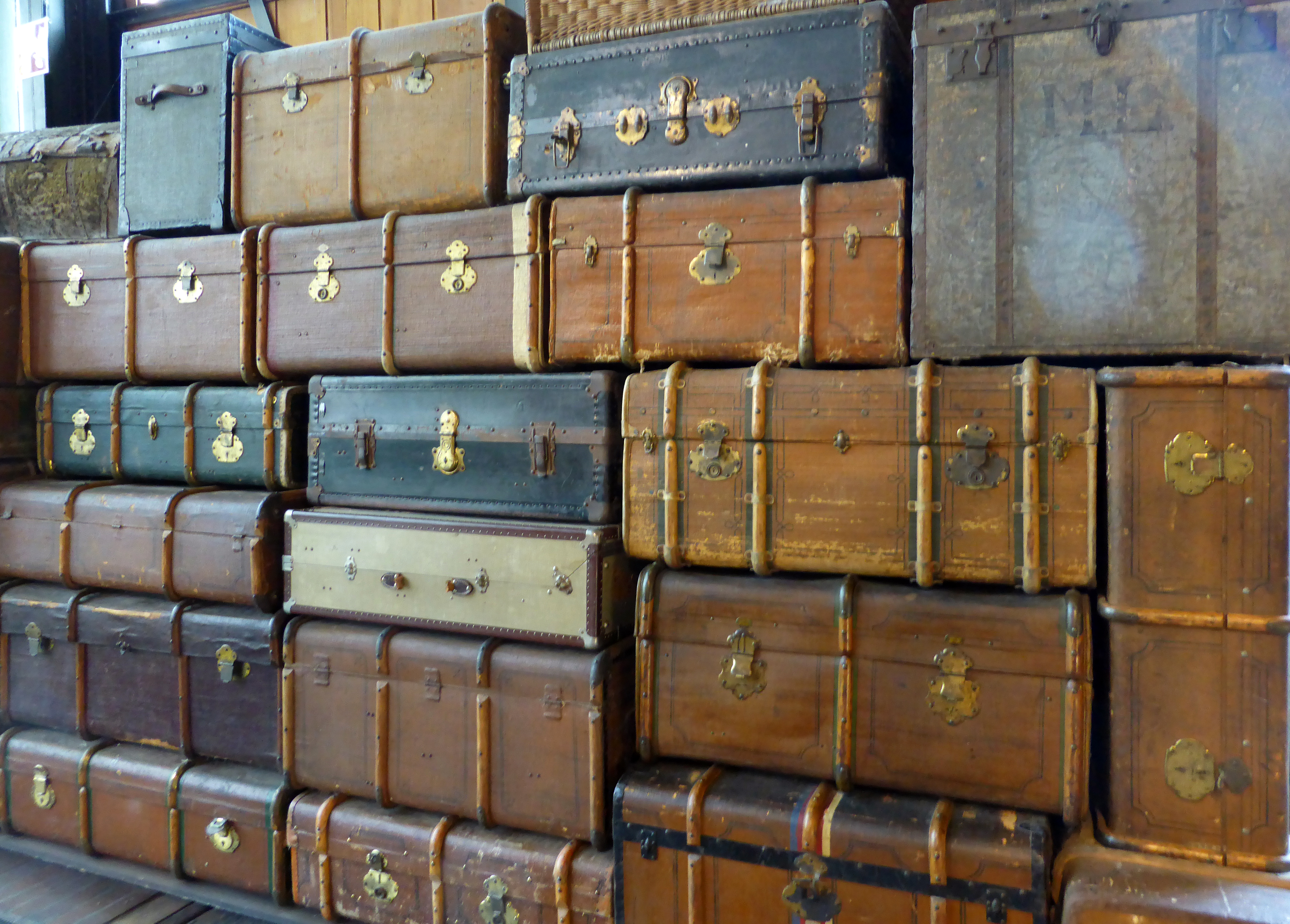 Koffer.... Ausgestellt im Deutschen Technikmuseum in Berlin. Wikipedianische KulTour am 10. Oktober 2015 in der Ausstellung des Museums.